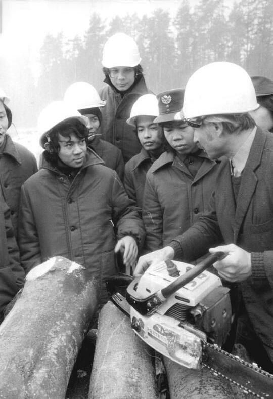 Kunsterspring, Ausbildung zum Forstfacharbeiter ADN-ZB Reiche 2.2.1981 Hü Bez. Potsdam: Solidarität- 15 junge Kampuchenaer begannen eine praktische Ausbildung zum Forstfacharbeiter. An der Forstschule in Kunsterspring bei Neuruppin erwerben sie während einer zweieinhalbjährigen Lehre Kenntnisse in der Baumschulsarbeit, bei der Aufforstung, der Harzung und dem Holzeinschlag. Den Umgang mit der Motorsäge erklärt Lehrmeister Otto Meiritz seinen Schützlingen.